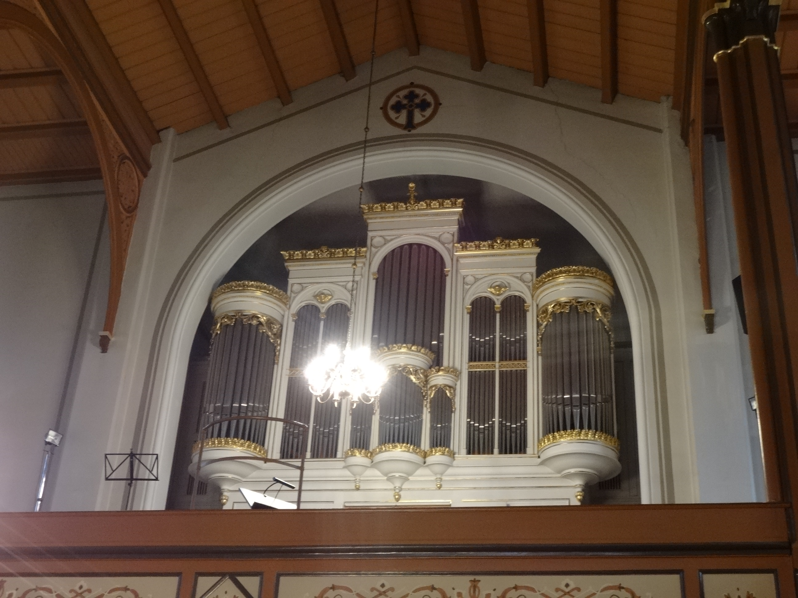 Evangelisch-Lutherische Kirche Berlin-Luisenstadt, auf Grund seiner Lage in der Annenstraße auch Annenkirche genannt.